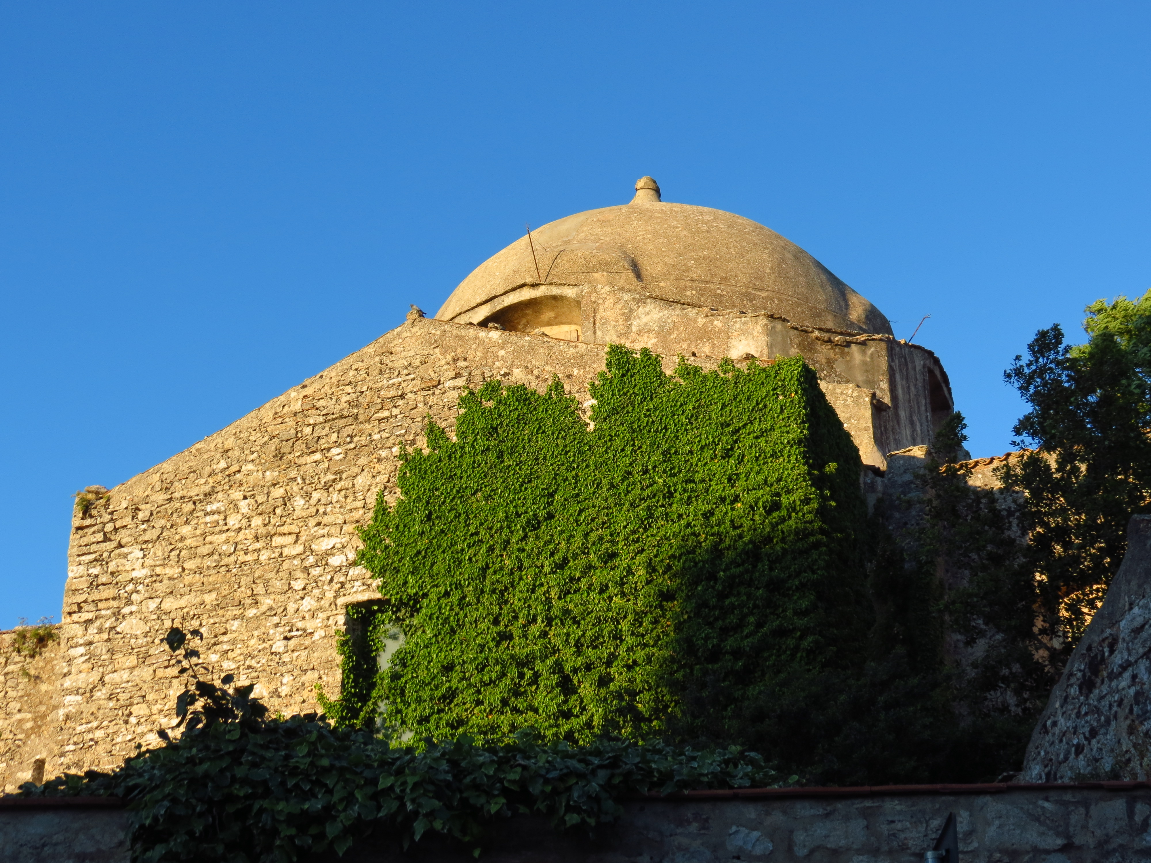 Vue de la Sicile.